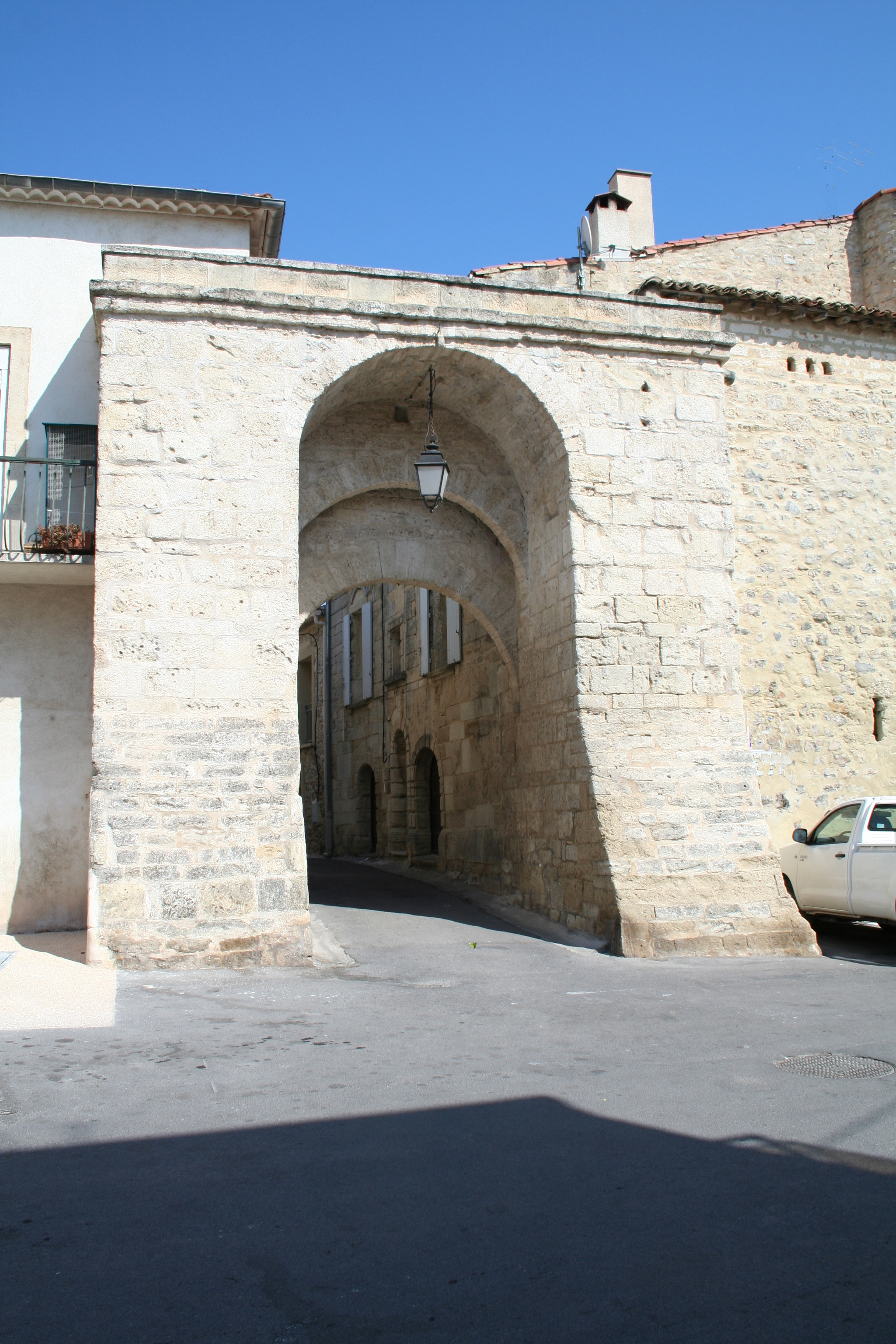 Mireval (Hérault) - Porche (ancienne porte côté Frontignan) - Grand-Rue.